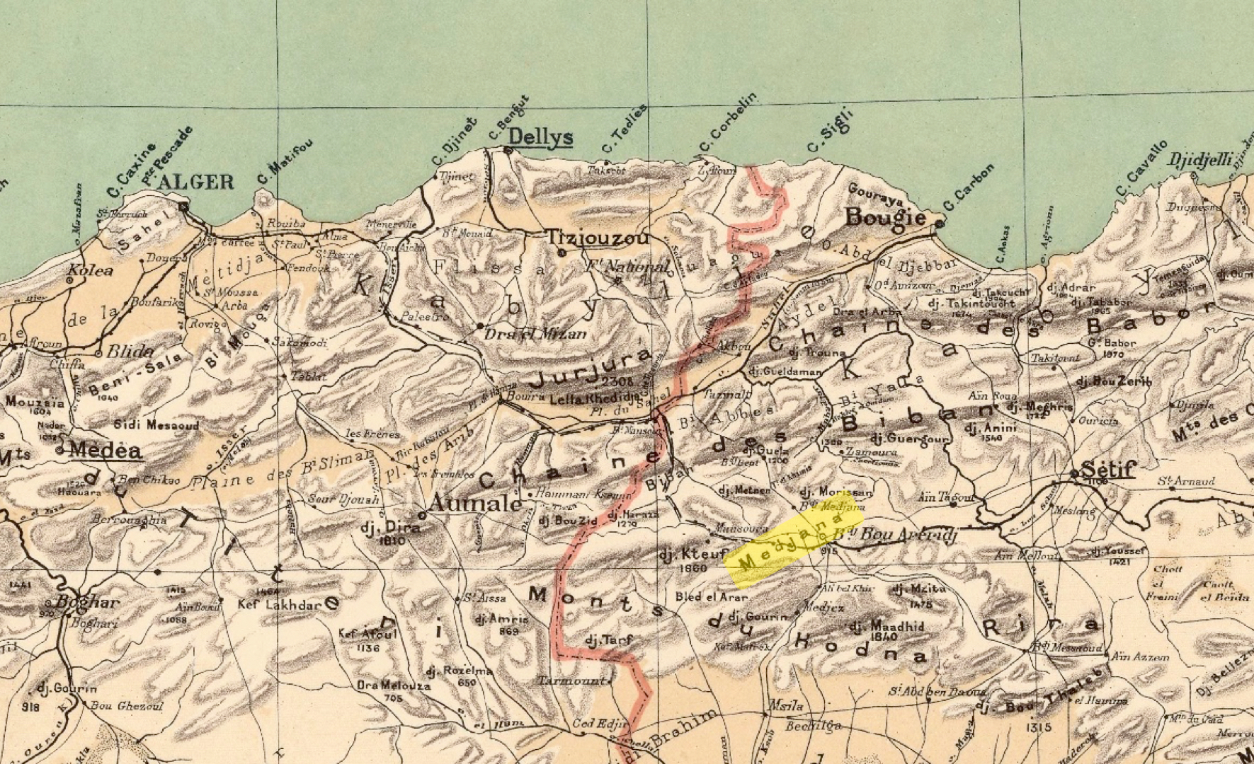 Algérie, extrait carte du commandant Niox, 1884, plaine de la Medjana surlignée